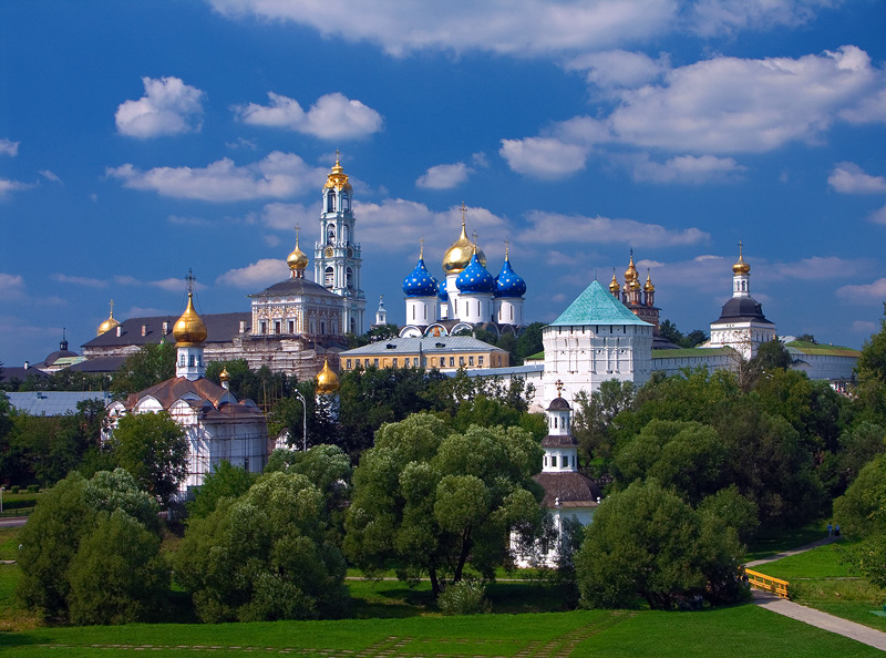 Ансамбль Троице-Сергиевской Лавры (Москва и Московская область, Сергиев Посад, Троице-Сергиева Лавра)